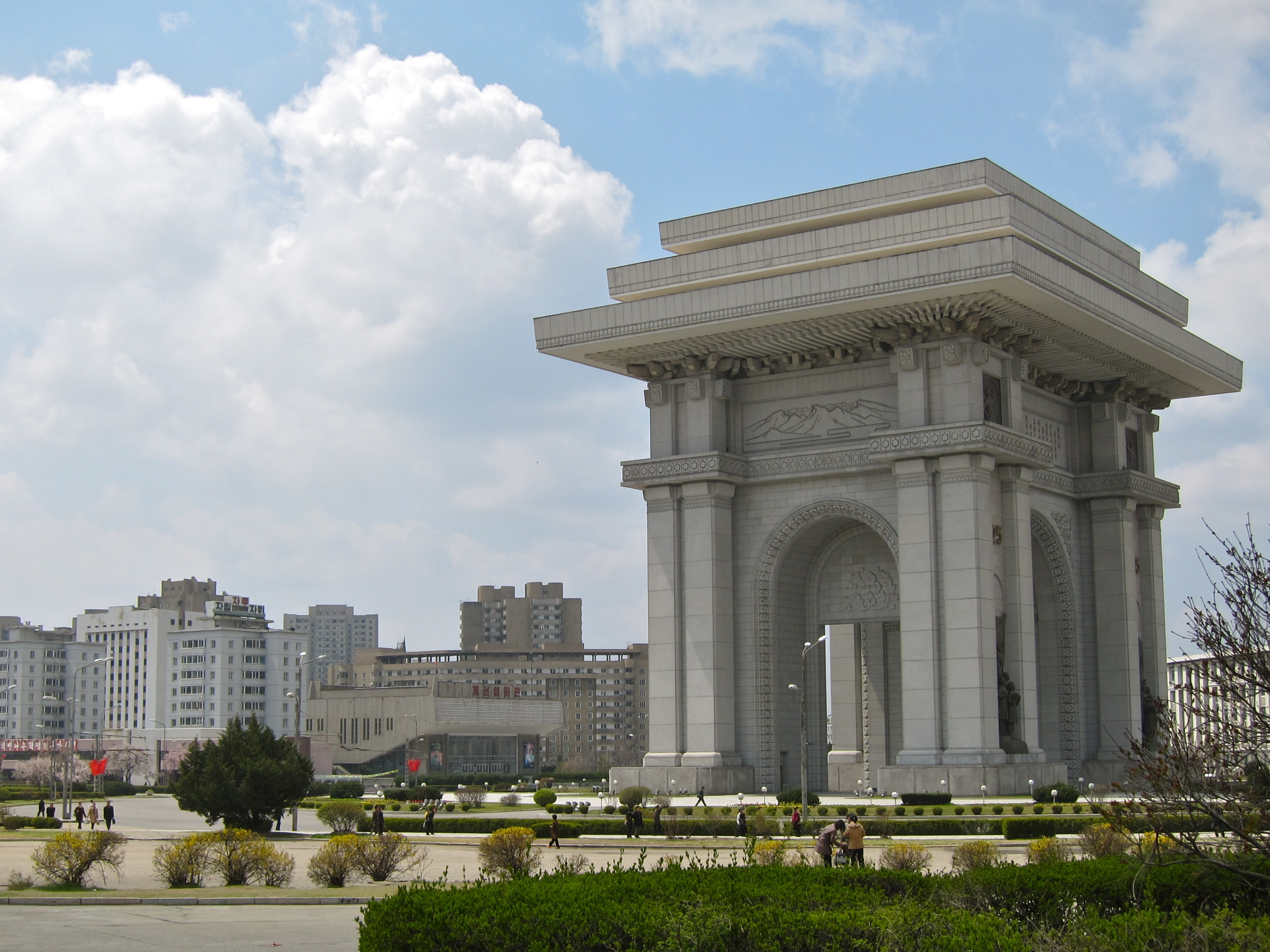 Pyongyang, DPRK (North Korea)